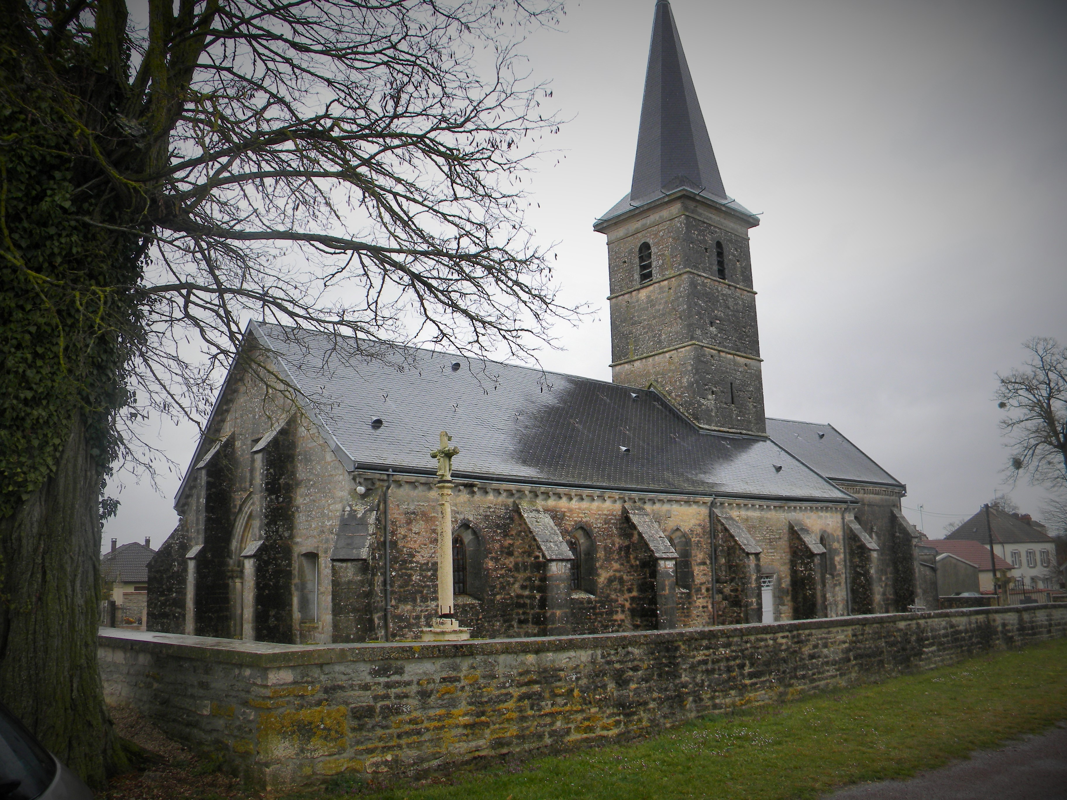 Preĝejo de Véronnes.